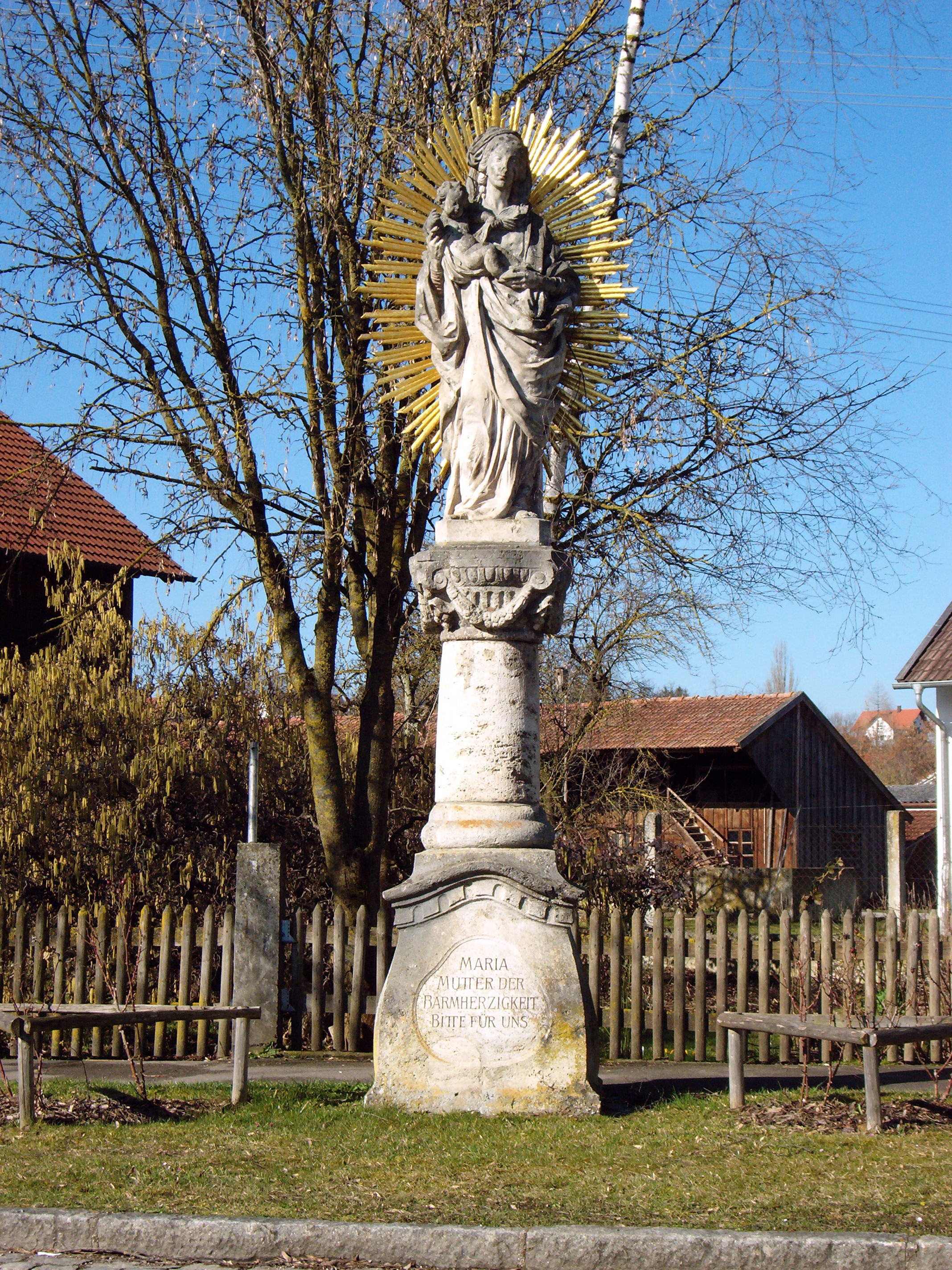 Denklingen, Mariensäule am Anfang der Hauptstrasse, Landkreis Landsberg am Lech